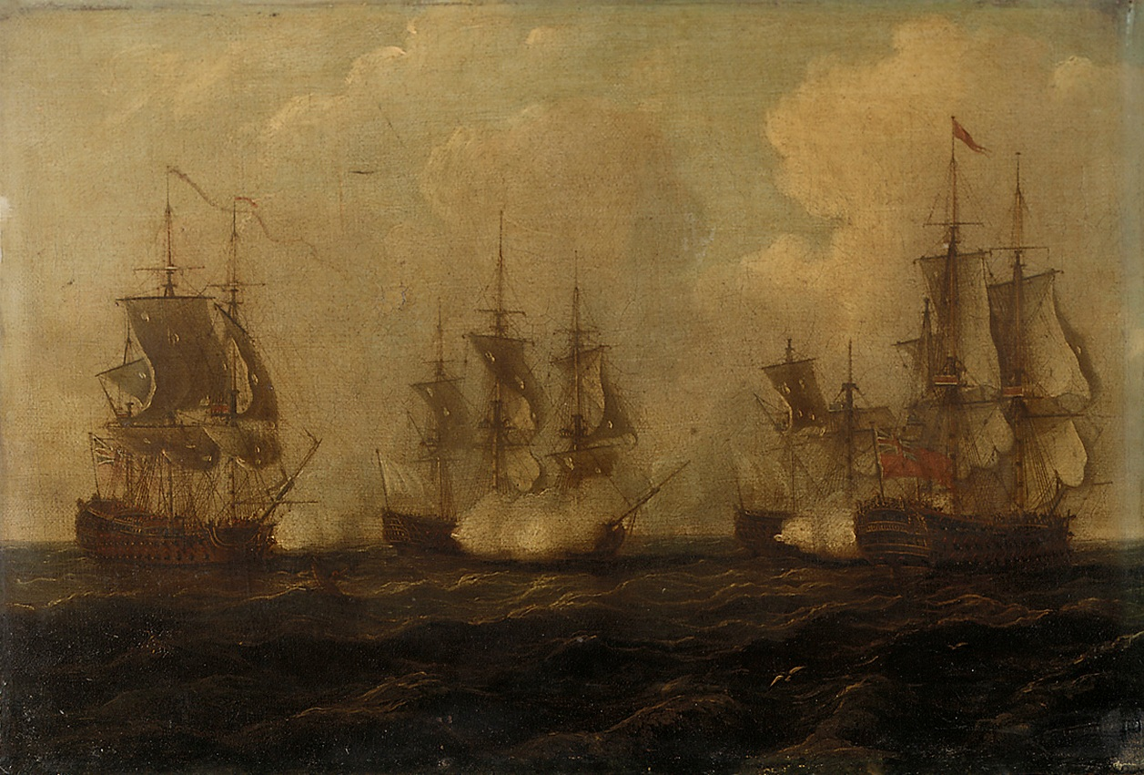 Bataille du Cap Français le 21 octobre 1757 sur les côtes de Saint-Domingue. Guerre de Sept Ans.